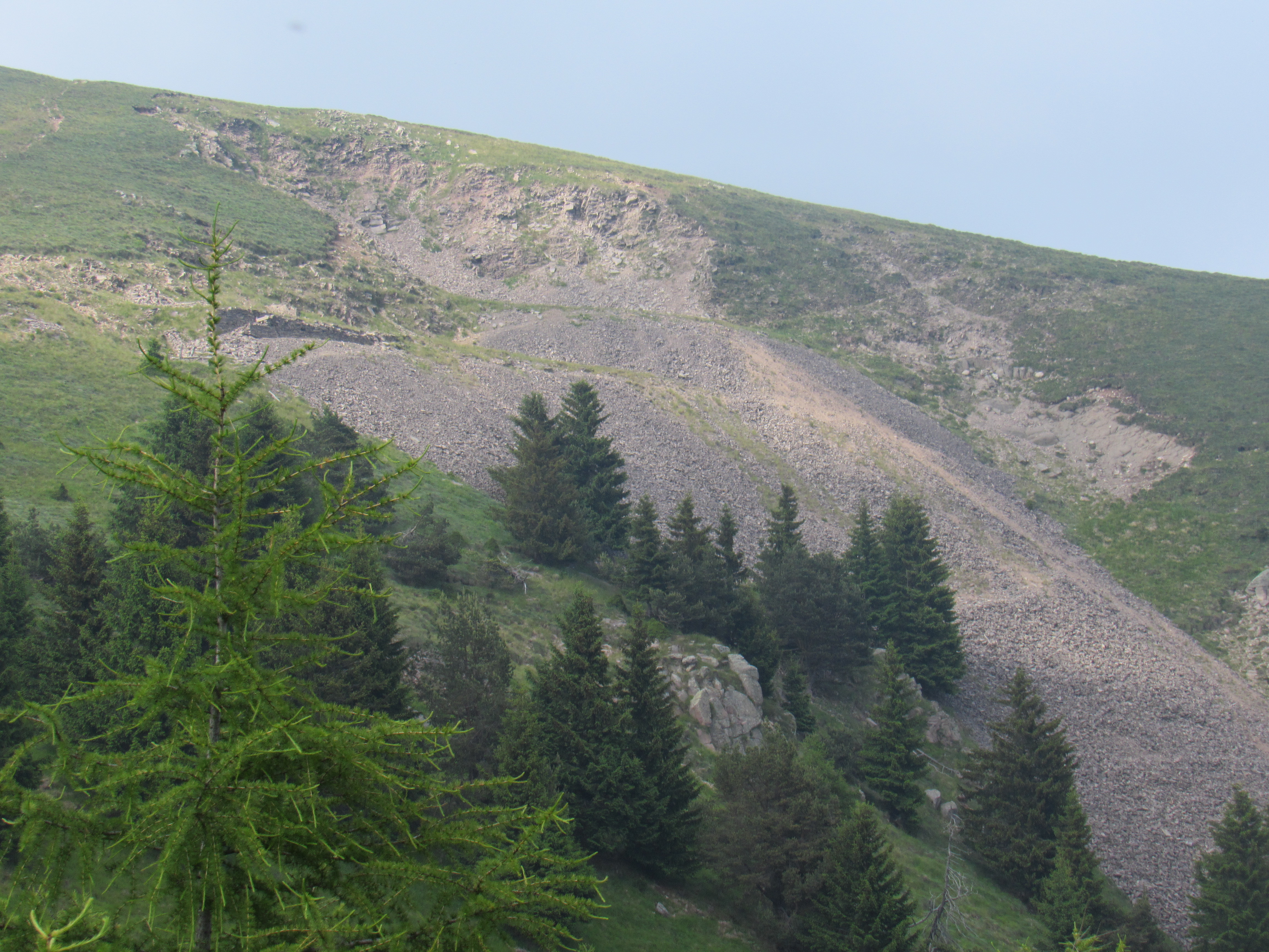 Dosso di Costalta (1955 m), Lagorai.